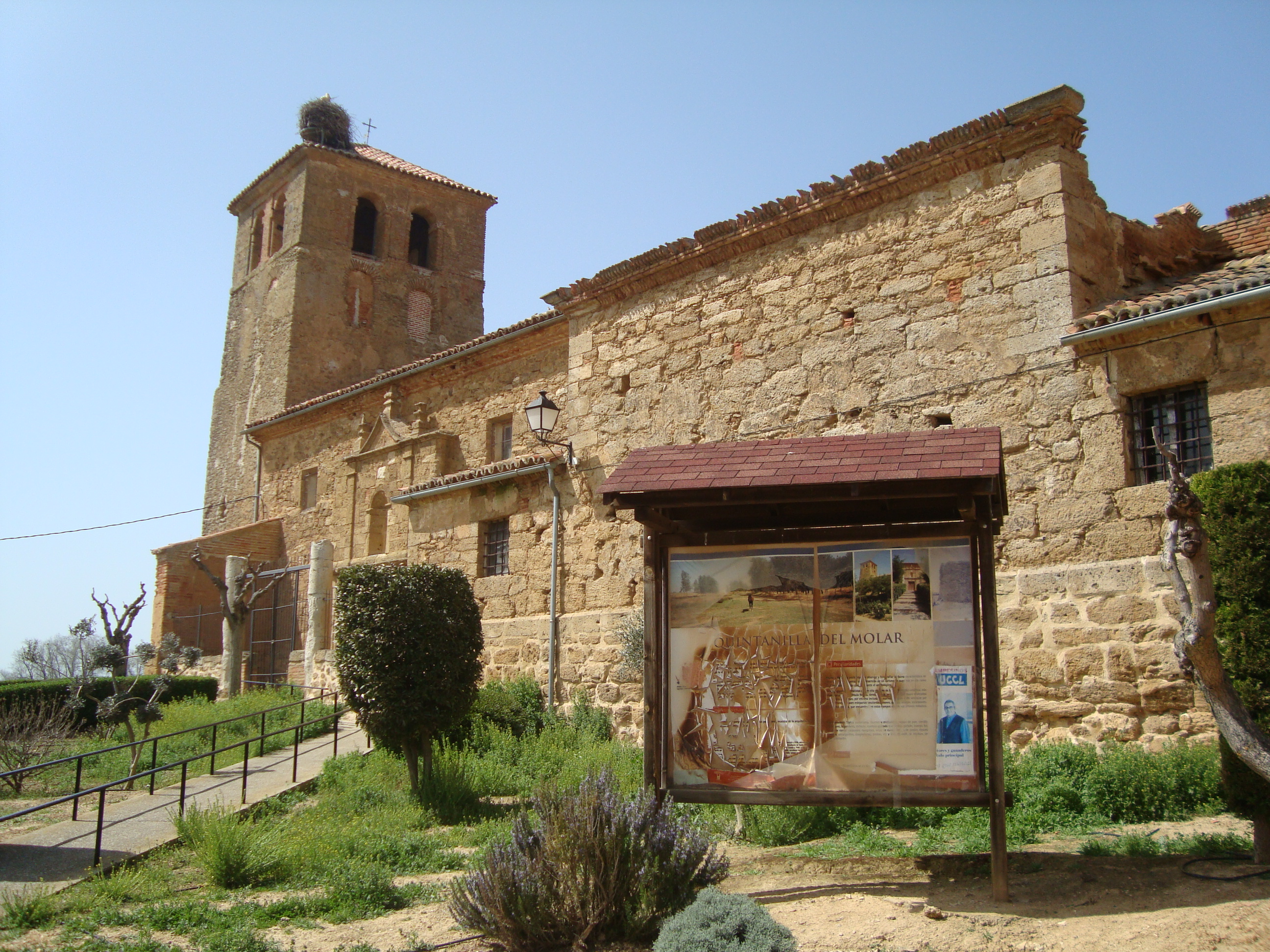 Iglesia de Santo Tomás en Quintanilla del Molar (Valladolid), barroca del siglo XVIII.